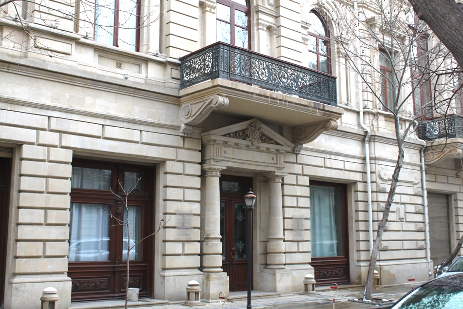 Музей истории Азербайджана